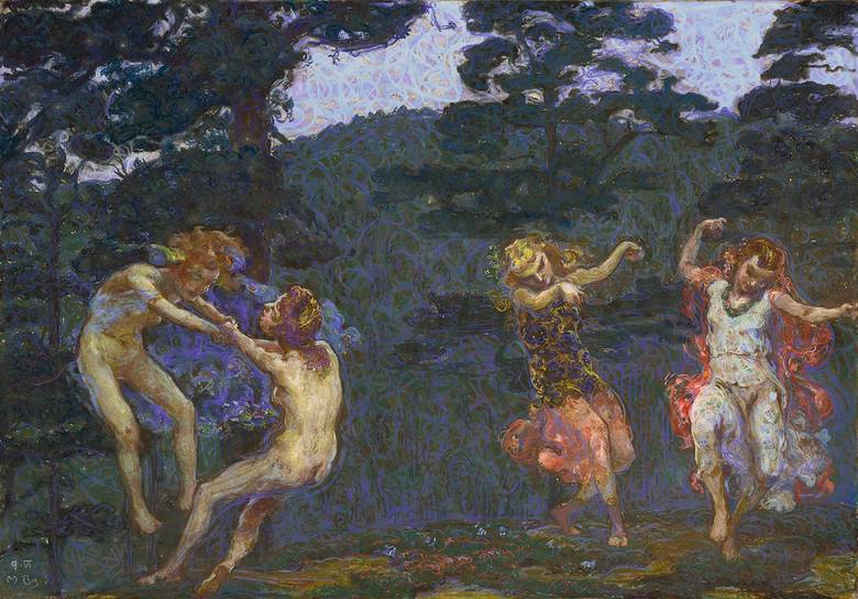 Elfenreigen, um 1906/09. Pastell auf Karton. 95,5 x 139,2 cm. Unten links datiert und monogrammiert: 9-VI M Bg.